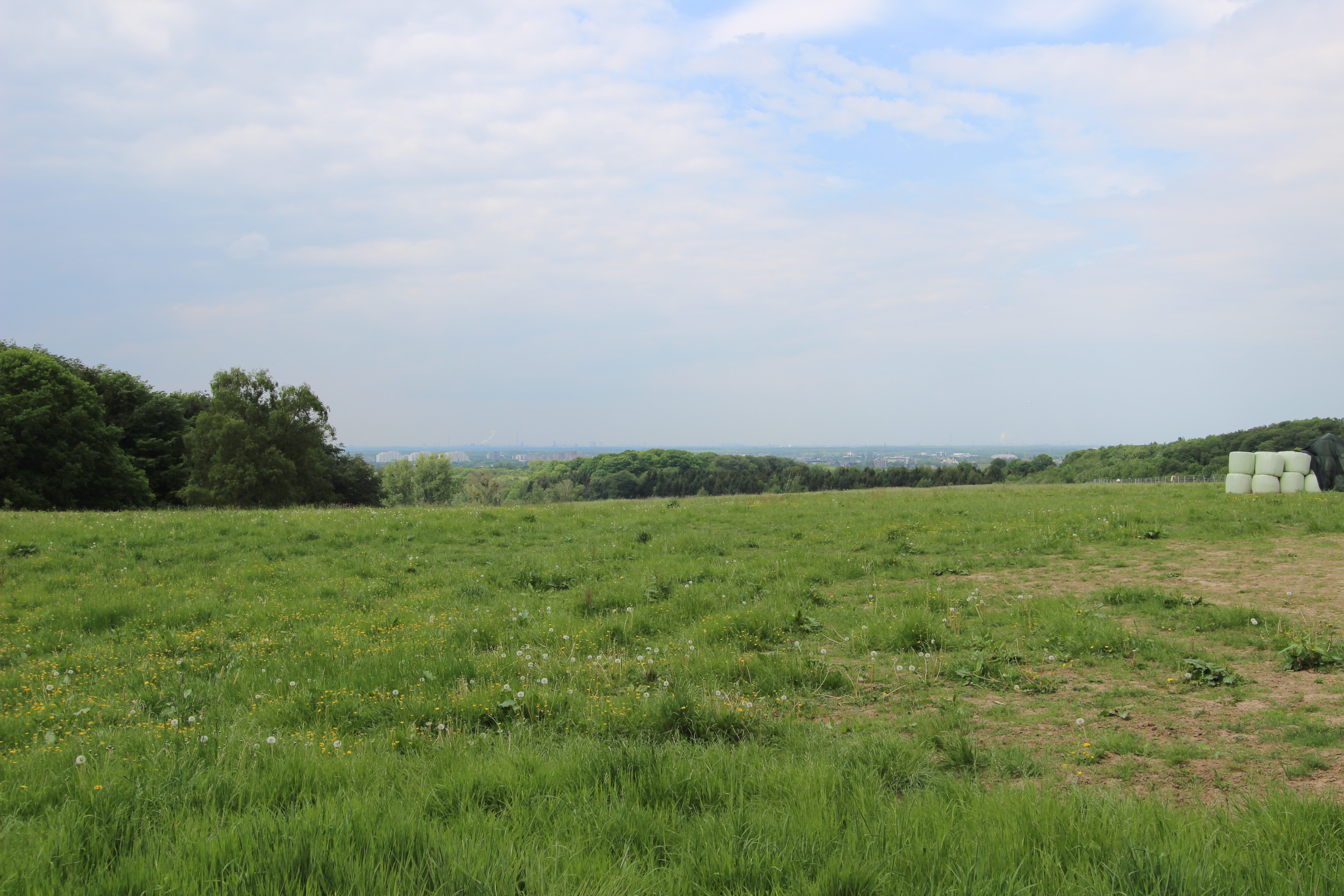 40472 Düsseldorf-Rath; Hochebene des Aaper Waldes. Blickrichtung vom Grüttersaaper Weg auf Ratingen. Aufnahme von 2016.